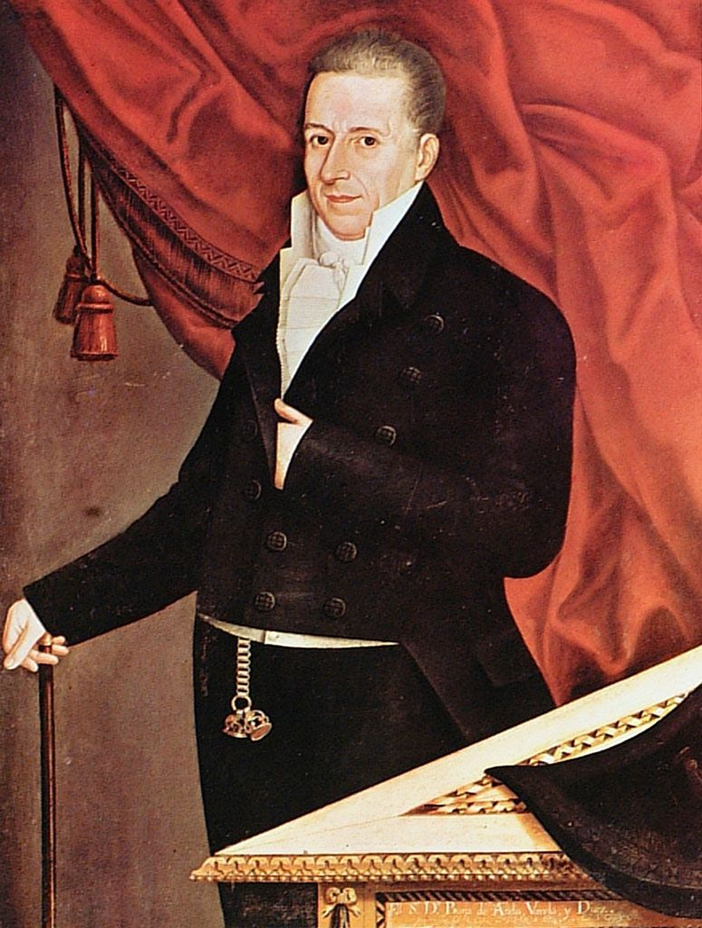 Ignacio Andia y Varla Diaz (1557-1822) pintor, escultor y dibujante